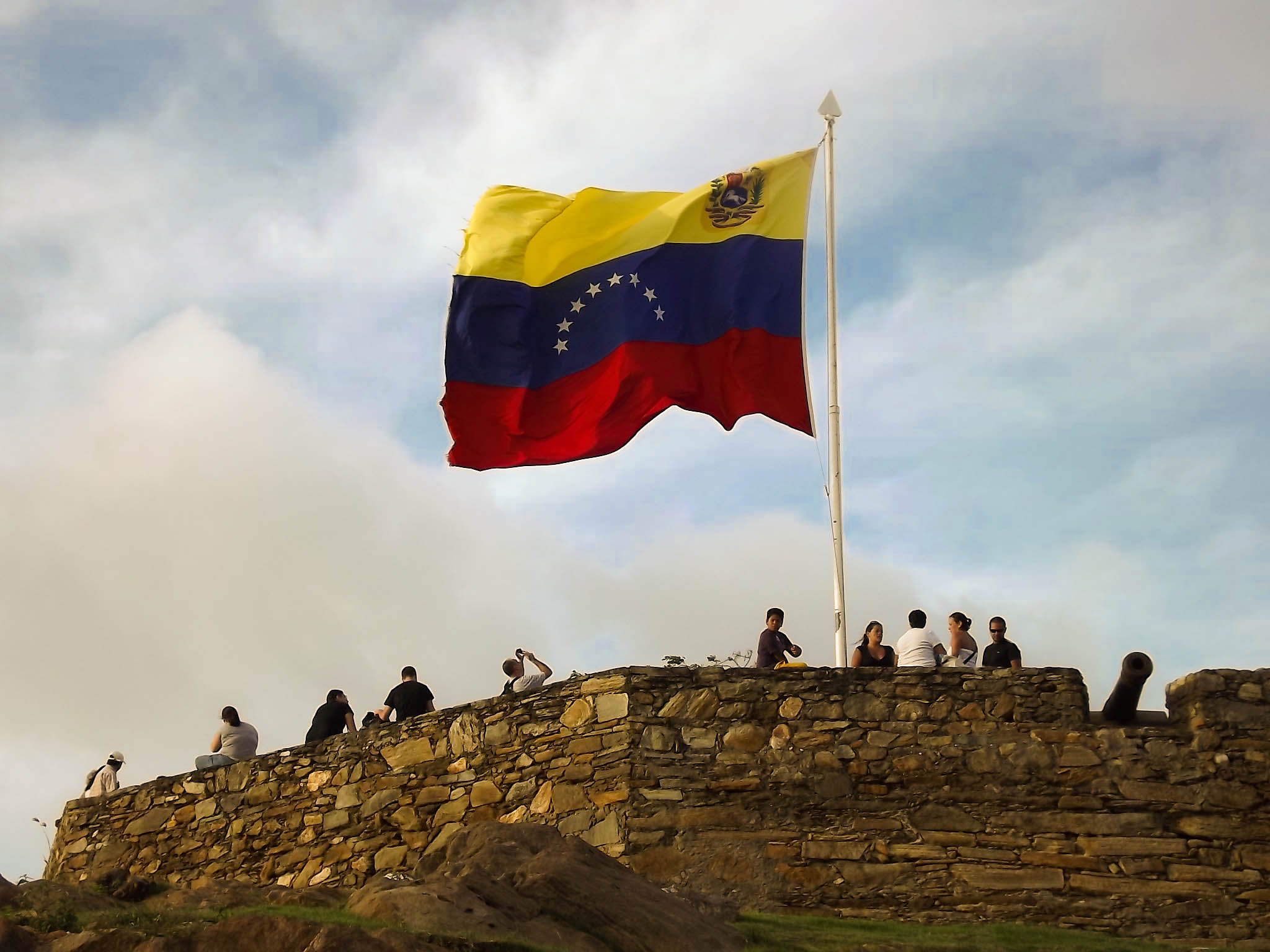 Margarita 2012